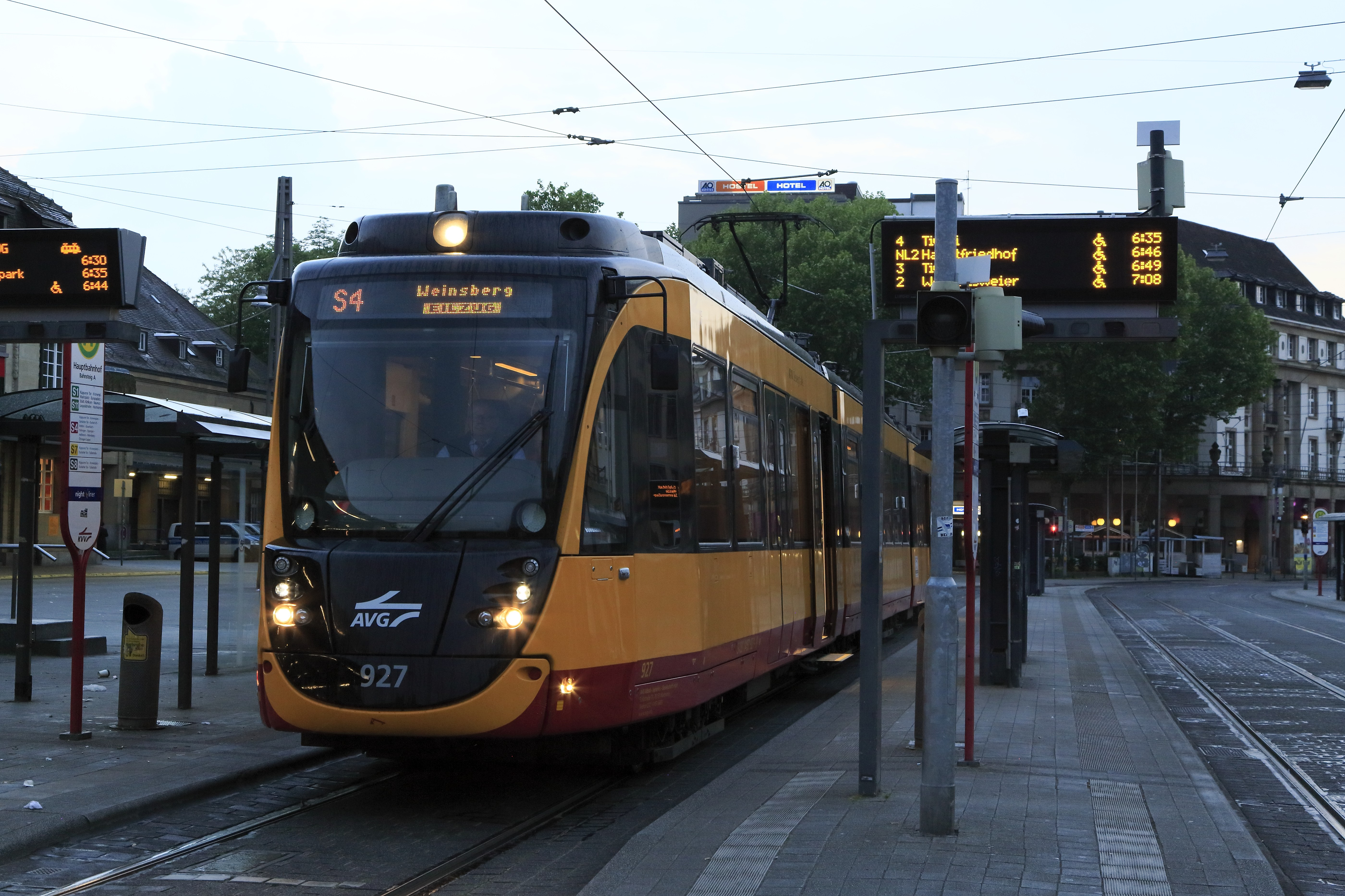 Der Eilzug der Linie S4 fährt am frühen Morgen des 10. Mai 2018 nach Weinsberg. Die dreiteiligen Wagen des Typs ET 2010 sind trotz ihrer Ähnlichkeit im Aufbau nicht mit den NET 2012 verwandt, es sind keine Citylink, sondern Flexity Swift von Bombardier mit Mittelflureinstiegen. Diese Wagen sind zweisystemfähige Zweirichtungswagen mit BO-Strab- und EBO-Zulassung. Die Zweirichtungsfähigkeit wird, wie im Bild sichtbar, an passenden Stellen auch genutzt, die linken Türen sind mit freigegeben.Die ET 2010 sind die ersten AVG-Triebwagen mit UIC-EDV-Nummern 94 80 0450 xxx, wobei die Ordnungsnummer mit der AVG-Wagennummer übereinstimmt. Wieder zeigt sich der Fehler, bei der Einführung der UIC-Nummern auf die DB zuviel Rücksicht zu nehmen. Alle Karlsruhere Zweisystemwagen erhalten unabhängig von ihrer Bauart die Stammnummer 0450, die damit erneut keine Bauartdifferenzierung ermöglicht, obwohl das System mit theoretisch 9999 Baureihen kaum jemals an seine Grenzen stoßen dürfte.